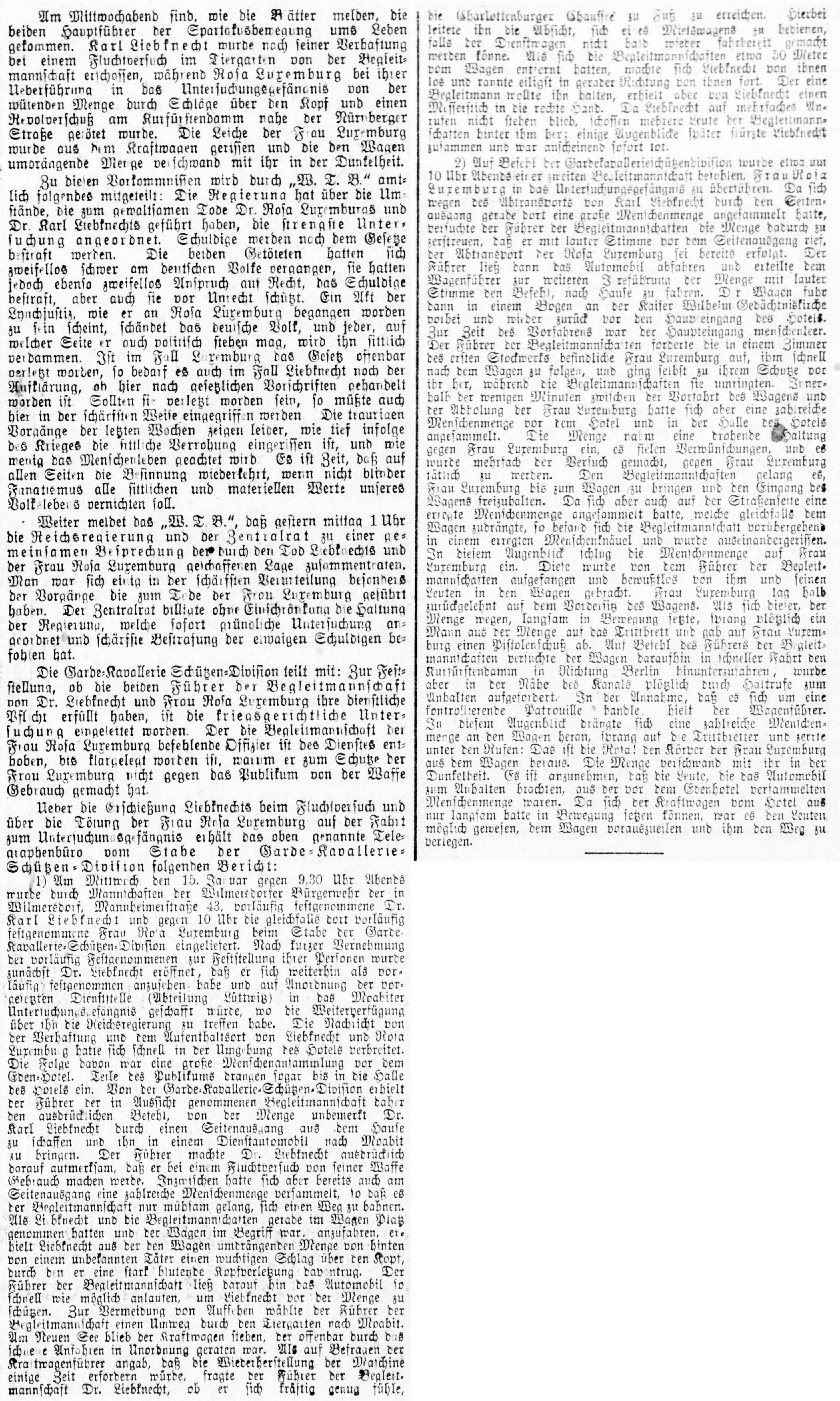 Zeitungsartikel aus dem Deutschen Reichsanzeiger zum Mord an Karl Liebknecht und Rosa Luxemburg